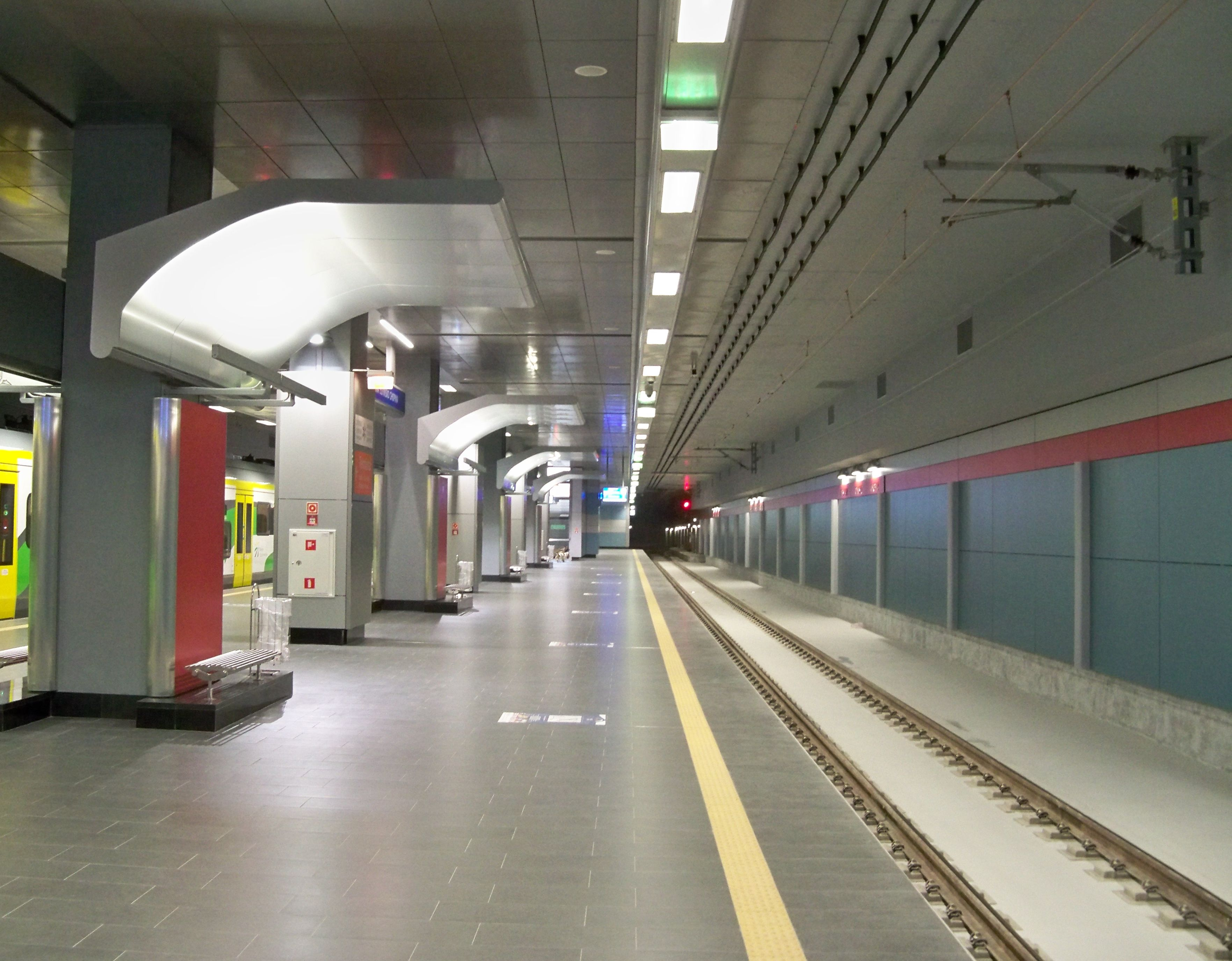 Peron stacji Warszawa Lotnisko Chopina